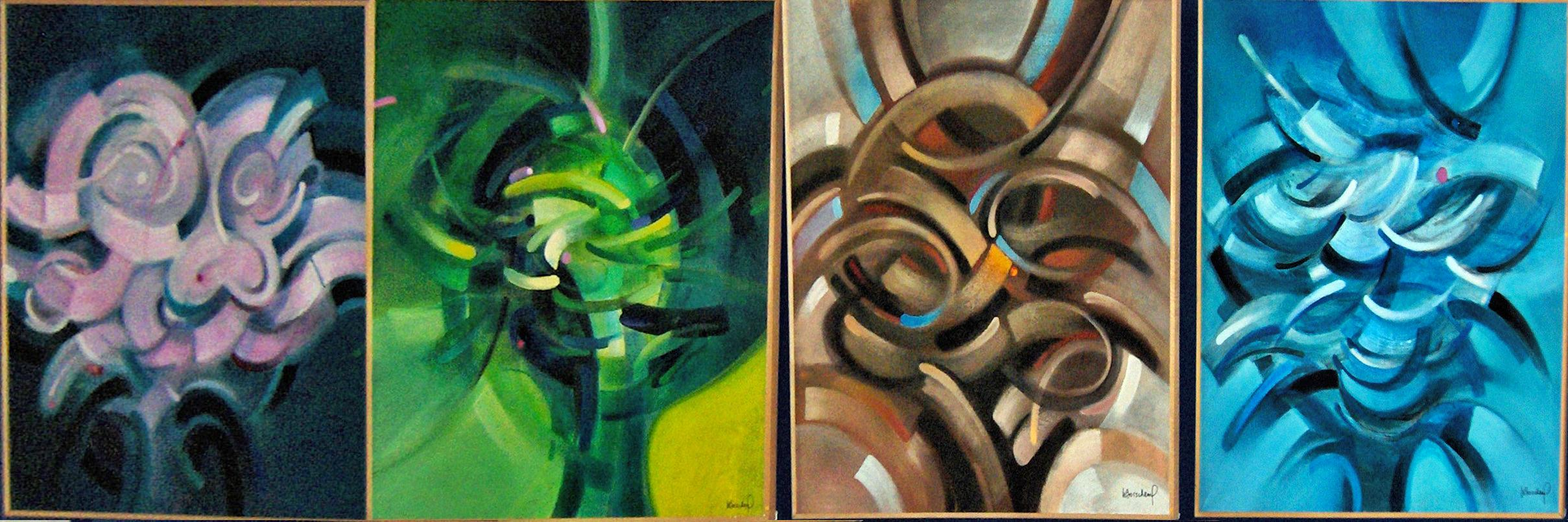 Vier seizoenen 1990 Acryl op doek 4 x 100 x100